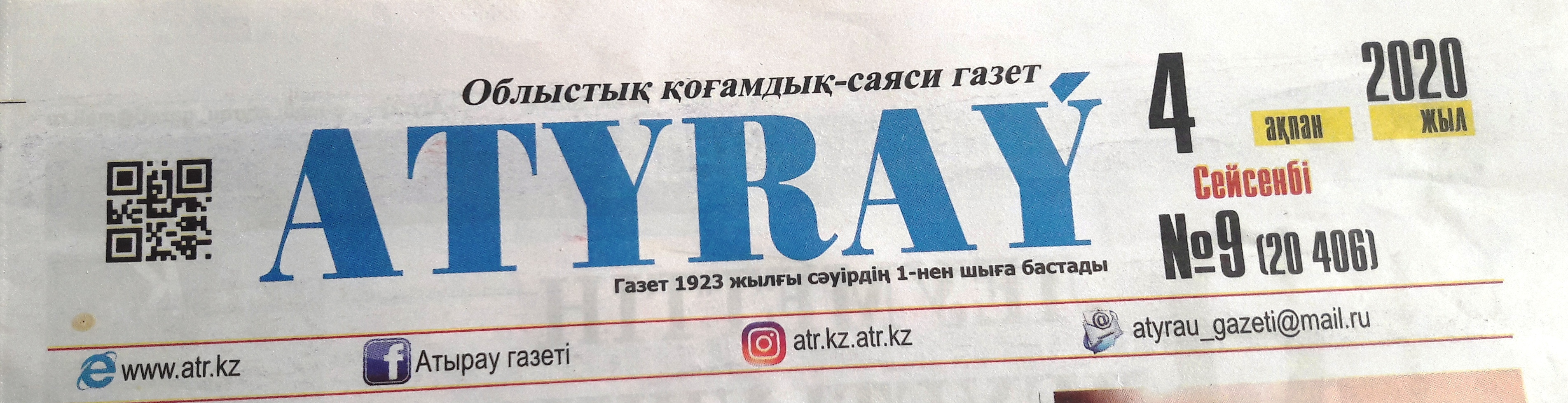 Атырау газета